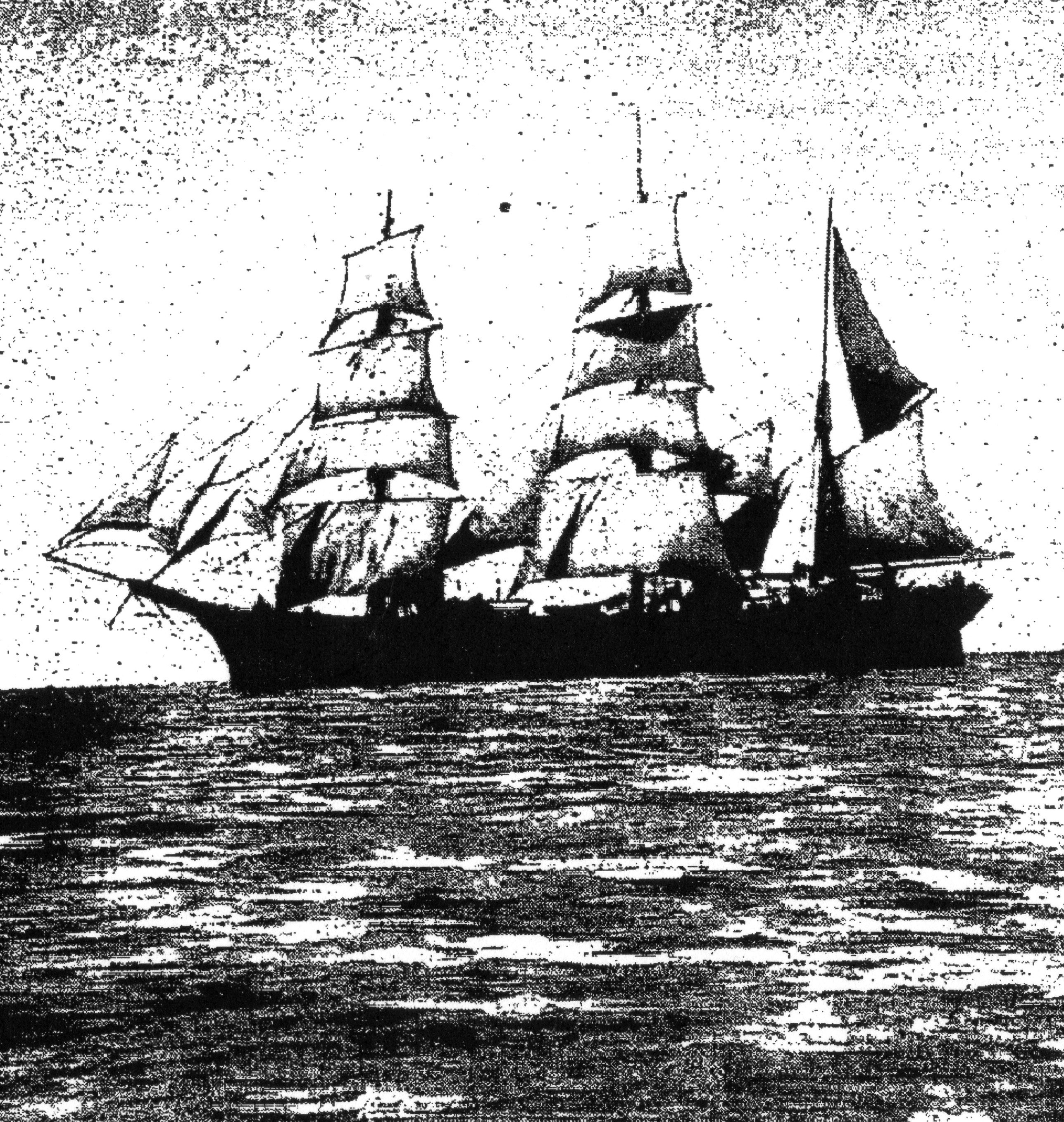 Chilenische Bark TINTO. 1852 in Liverpool gebaut, seit 1902 in cer chilenischen Handelsmarine. Endschicksal unbekannt.